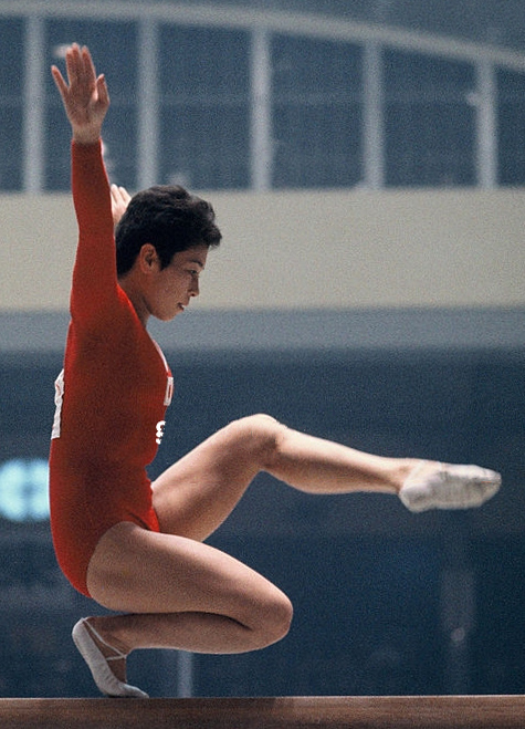 Keiko Tanaka-Ikeda at the 1964 Olympics